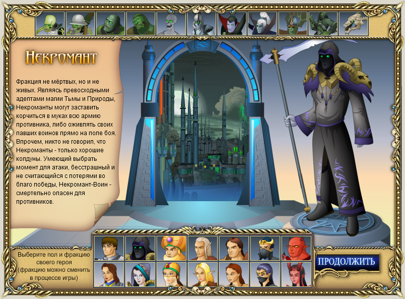 форма регистрации онлайн-игры HeroesWM